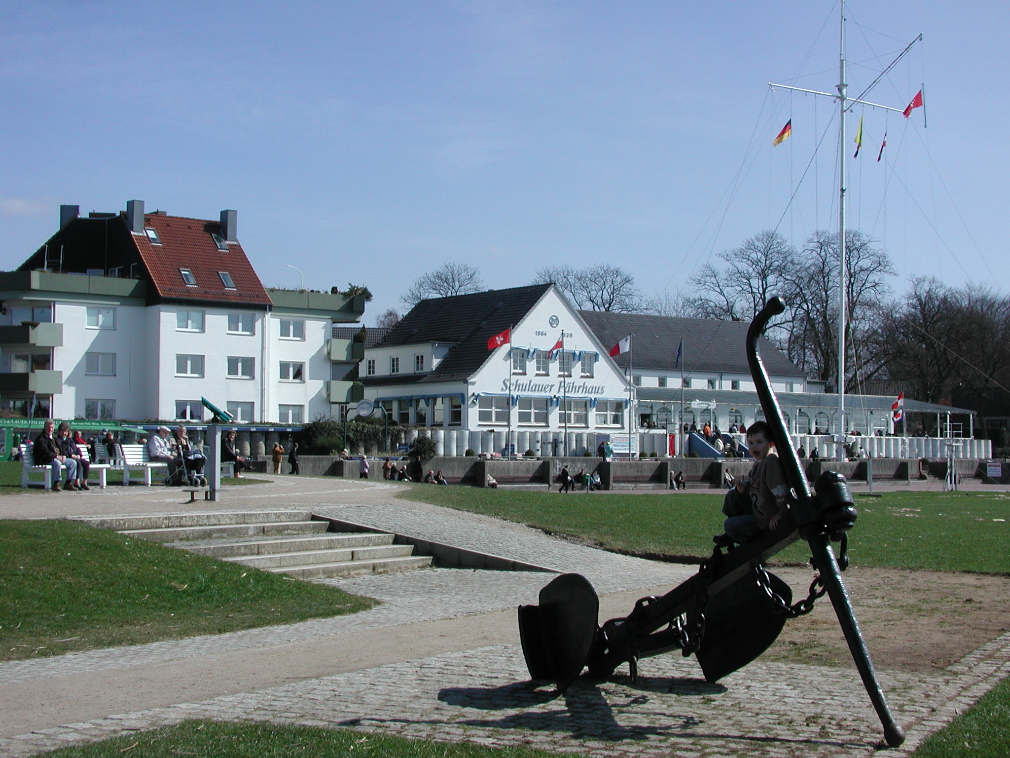 Ankerplatz in Schulau